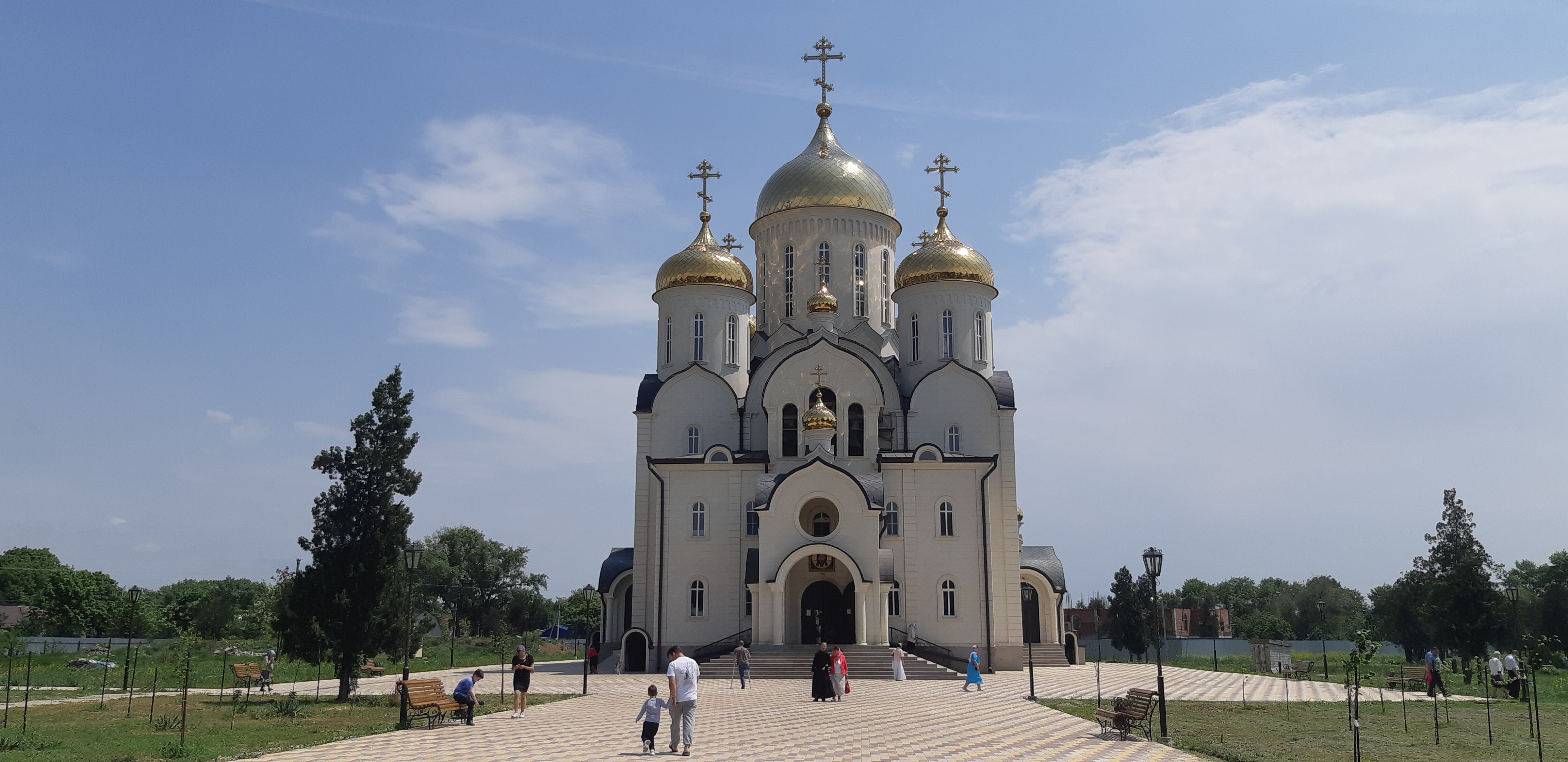 Кафедральный собор святого Георгия